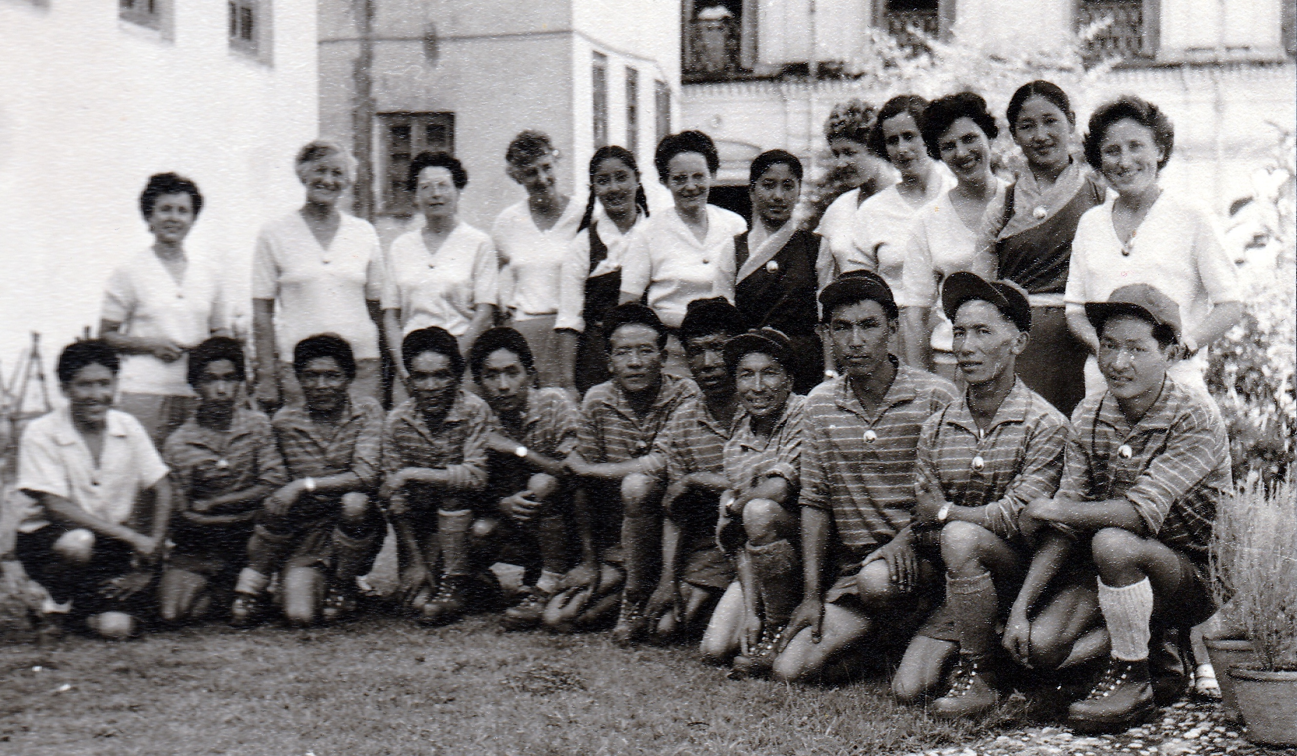 À l'arrière en blanc, de gauche à droite : Loulou Boulaz, Dorothée Gravina, Colette le Bret, Margaret Darval, Jeanne Franco, Claudine Van der Straten Ponthos, Eileen Healey, Micheline Rambaud; Claude Kogan. Au premier rang les sherpas. A l’extrême droite, le sirdar Wangdi.